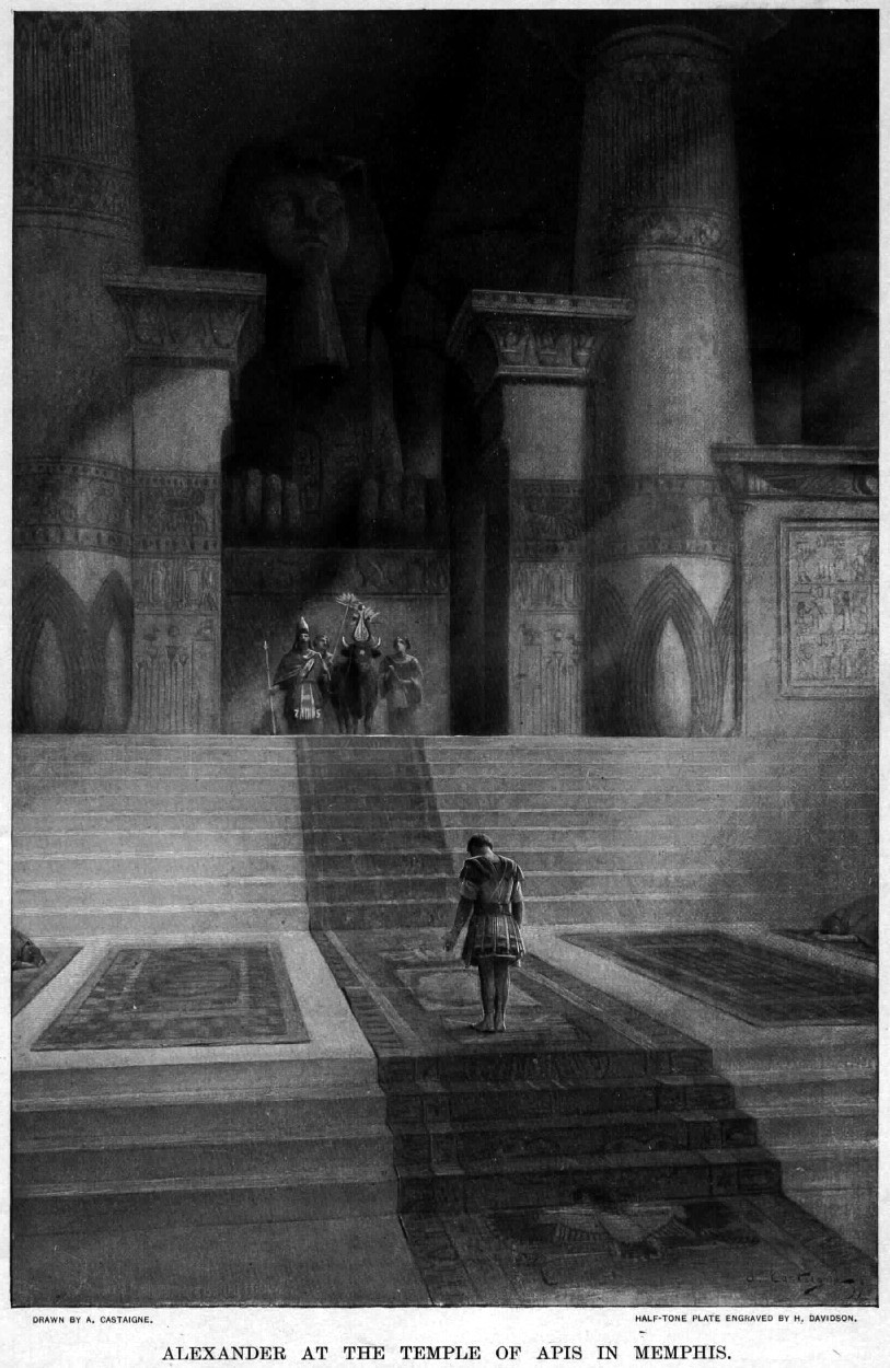 Alexander old drawings